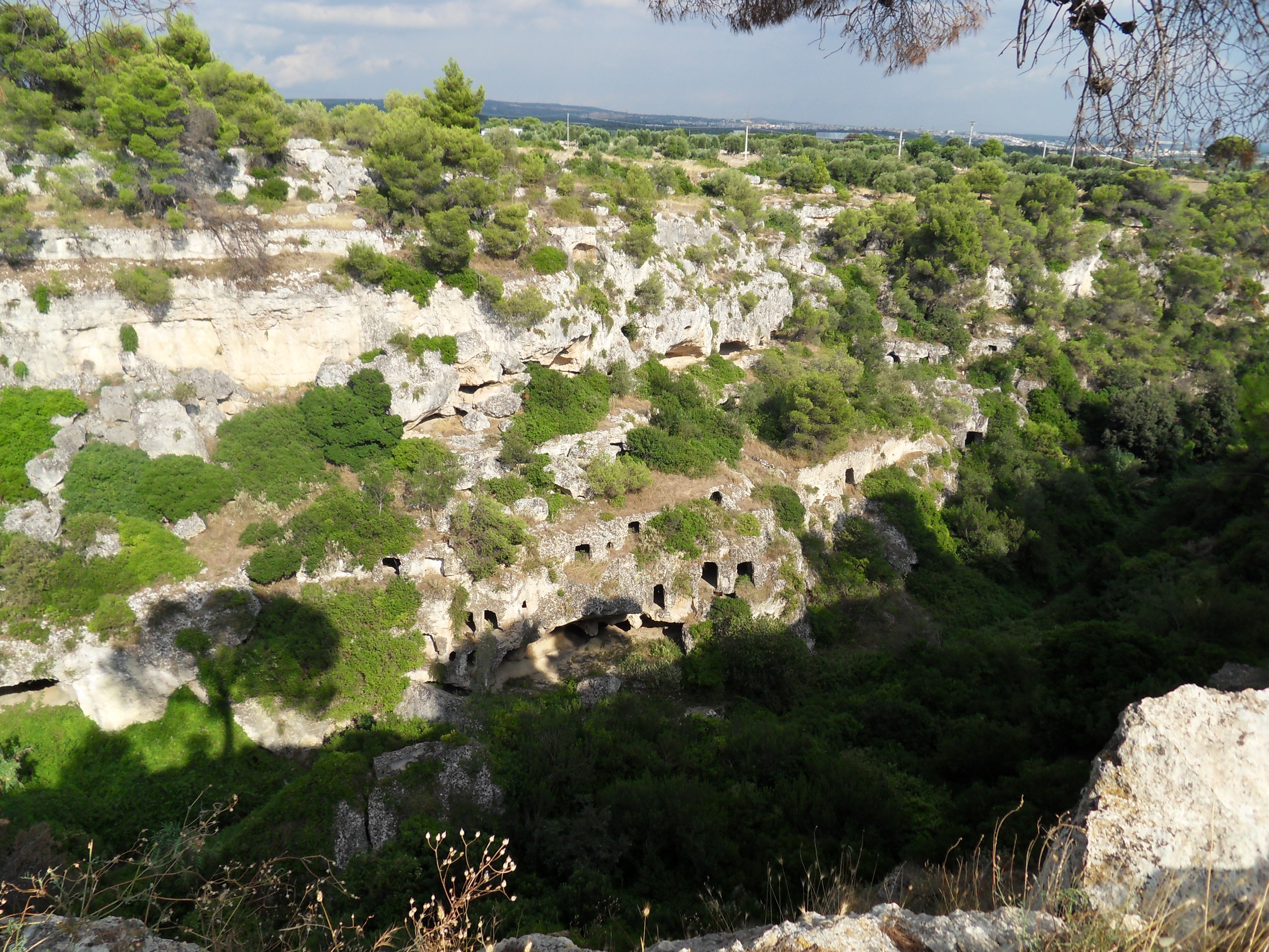 Gravina di Petruscio nel territorio di Mottola (TA)